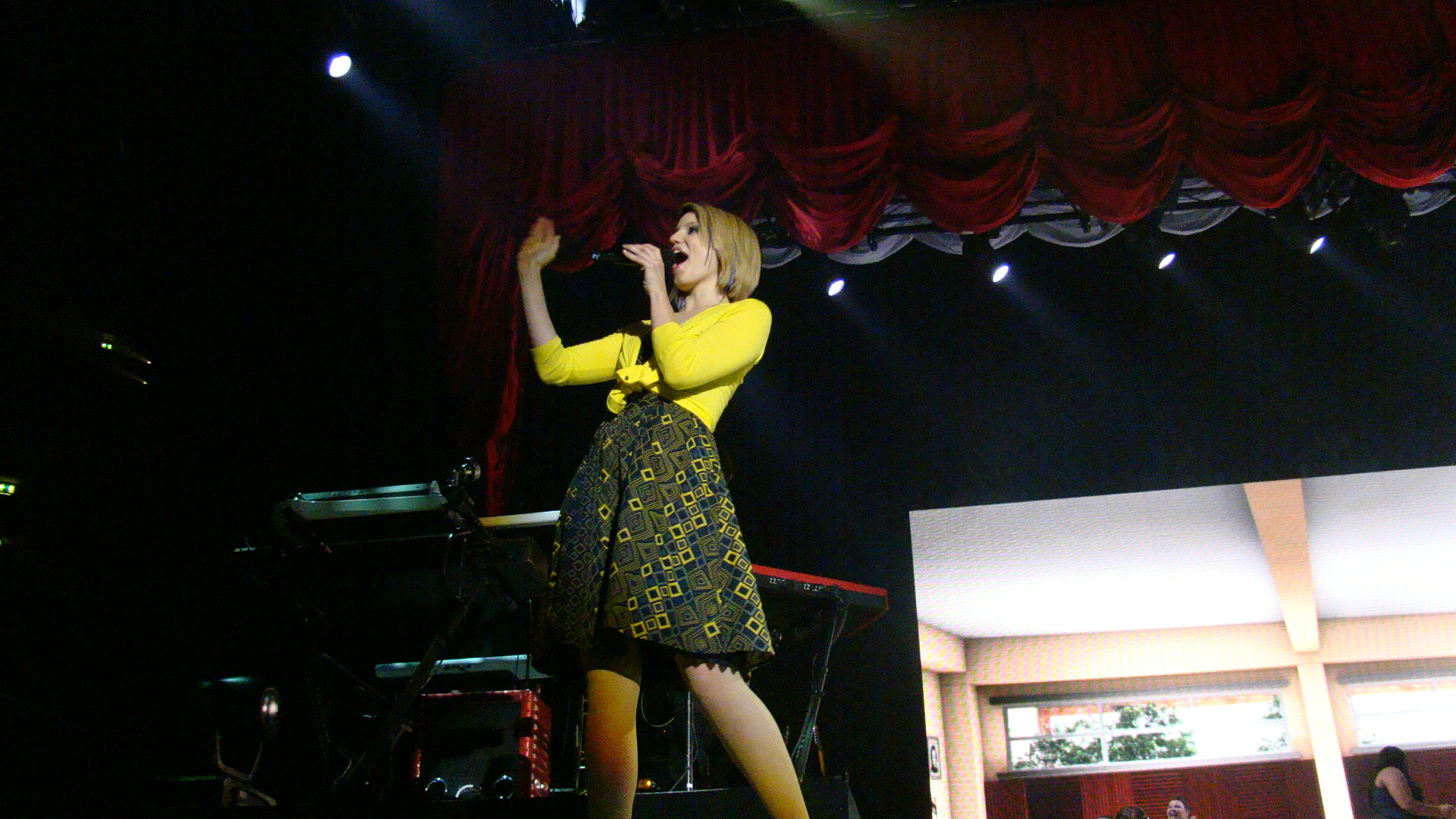 Lucky